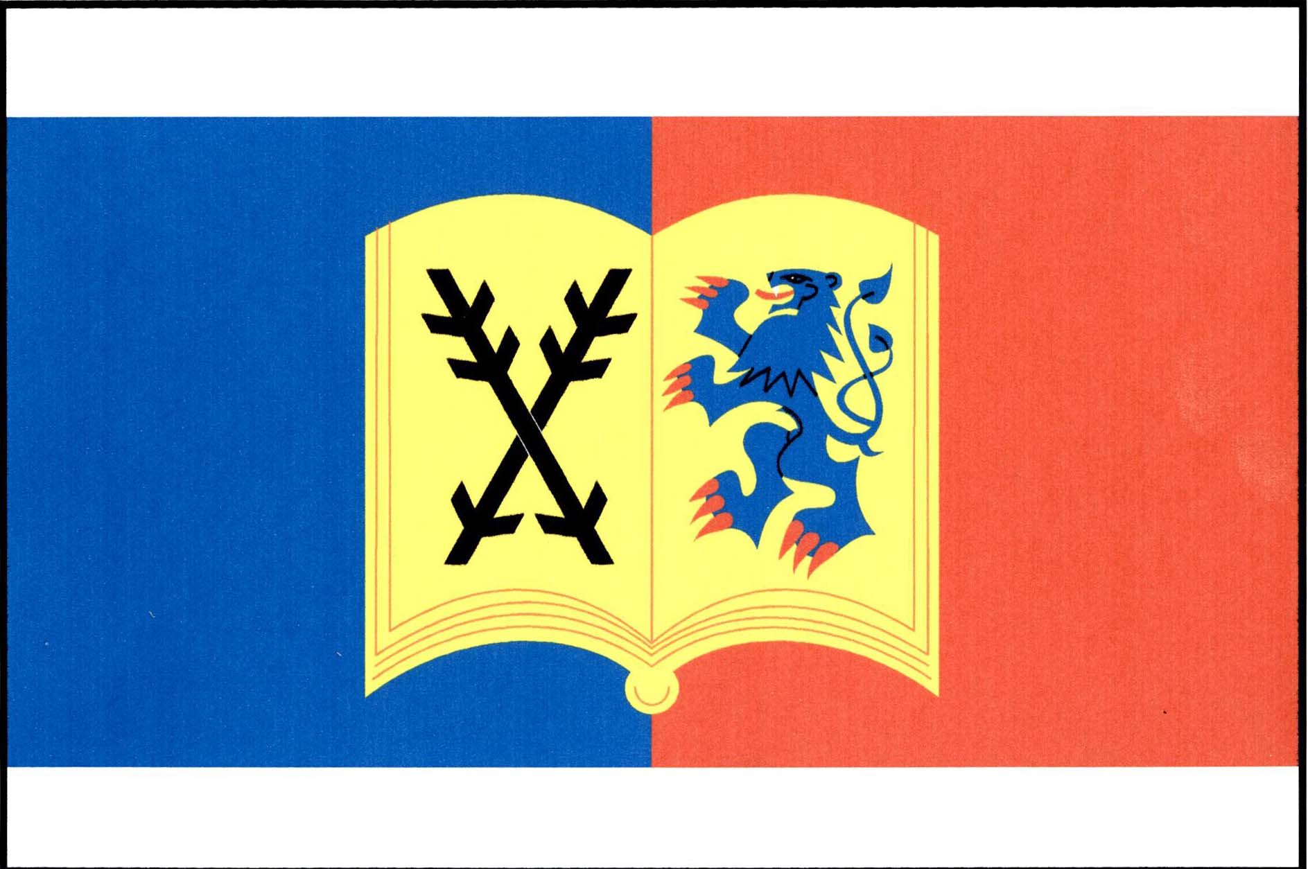 Vlajka obce Otradov